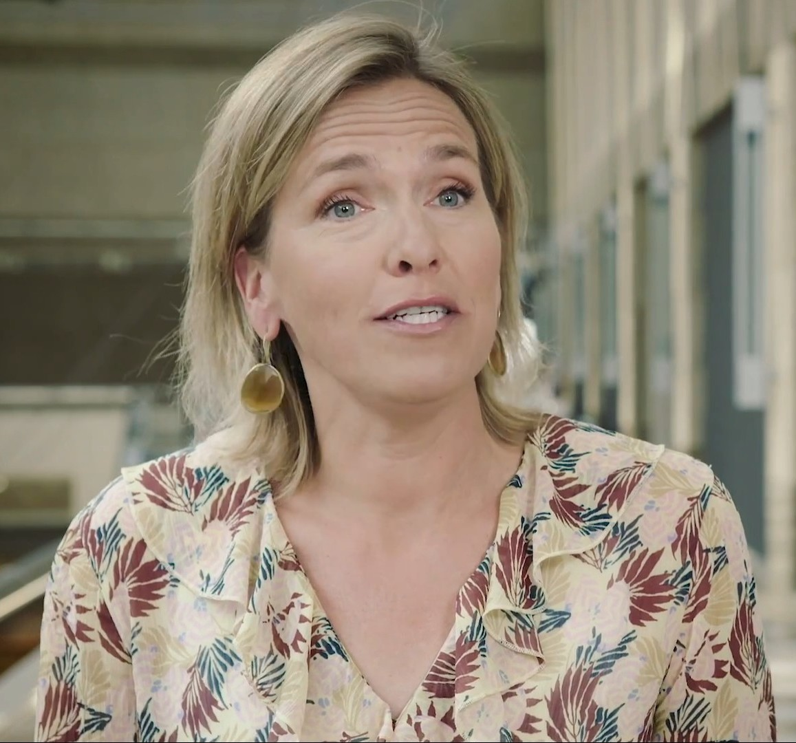 Wat doet de commissie OCW? Lerarenbeleid, onderwijstijd, studiefinanciering, podiumkunsten en het mediabestel. Het is een greep uit de onderwerpen waarover de commissie voor Onderwijs, Cultuur en Wetenschap (OCW) overleg voert met de bewindspersonen van OCW.